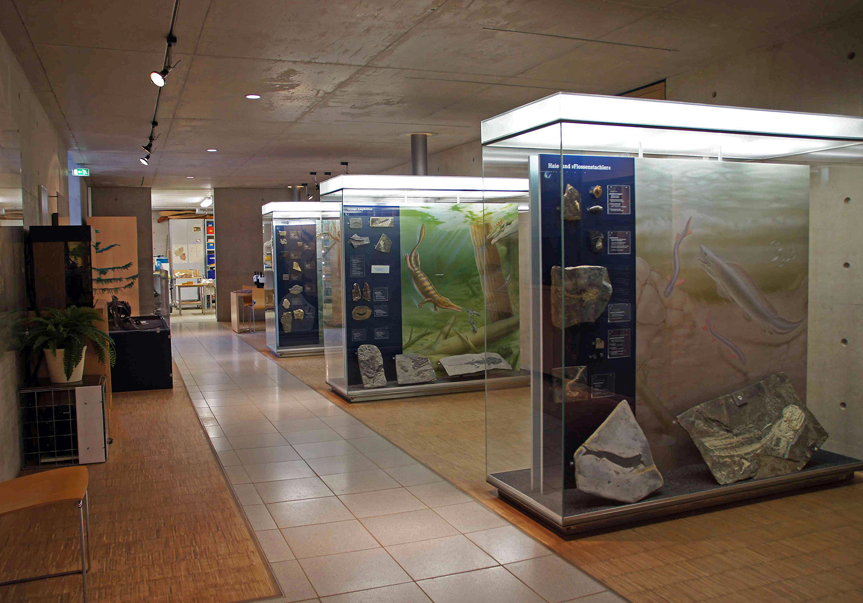 Blick auf den Dauerausstellungsbereich im Urweltmuseum GEOSKOP mit Originalfossilien aus dem Pfälzer Bergland